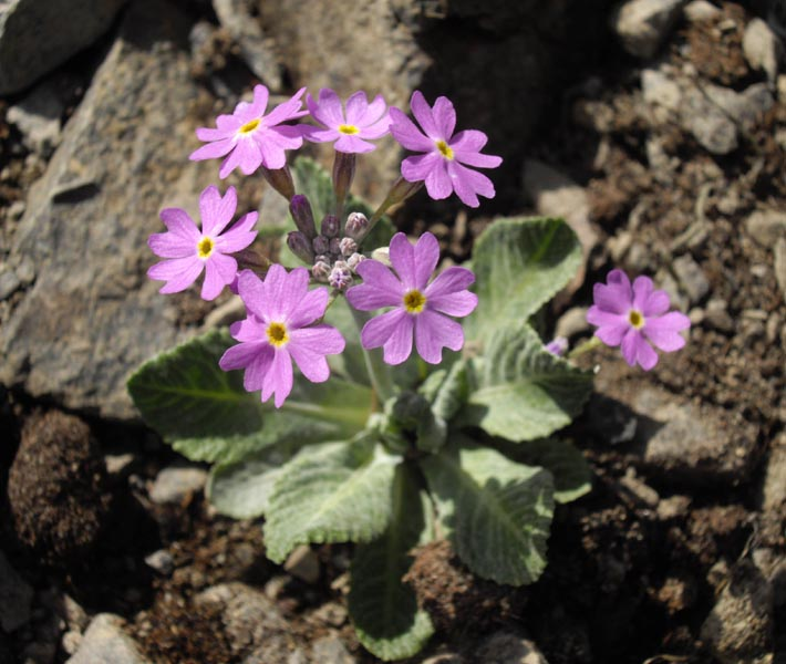 Primula fondosa